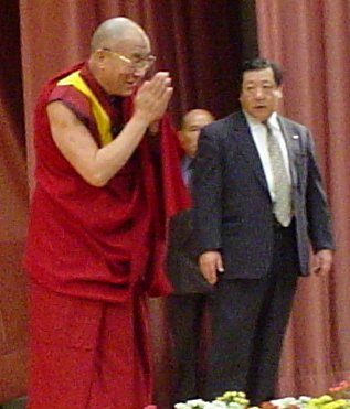 Dalai Lama: Dalai Lama in Tokyo Oct 2003